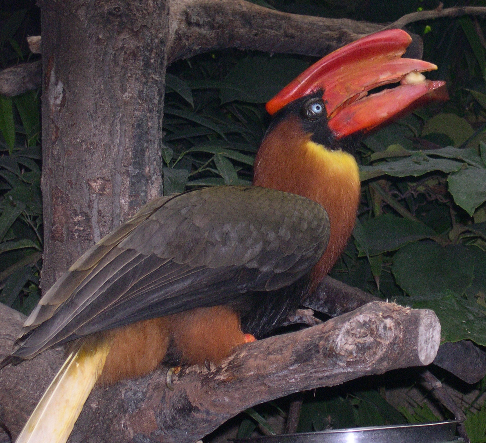 Een etende Rosse neushoornvogel (Buceros hydrocorax) in de Filipijnenhal van Avifauna in 2005 Foto genomen door: Magalhães op 8 nov. 2005